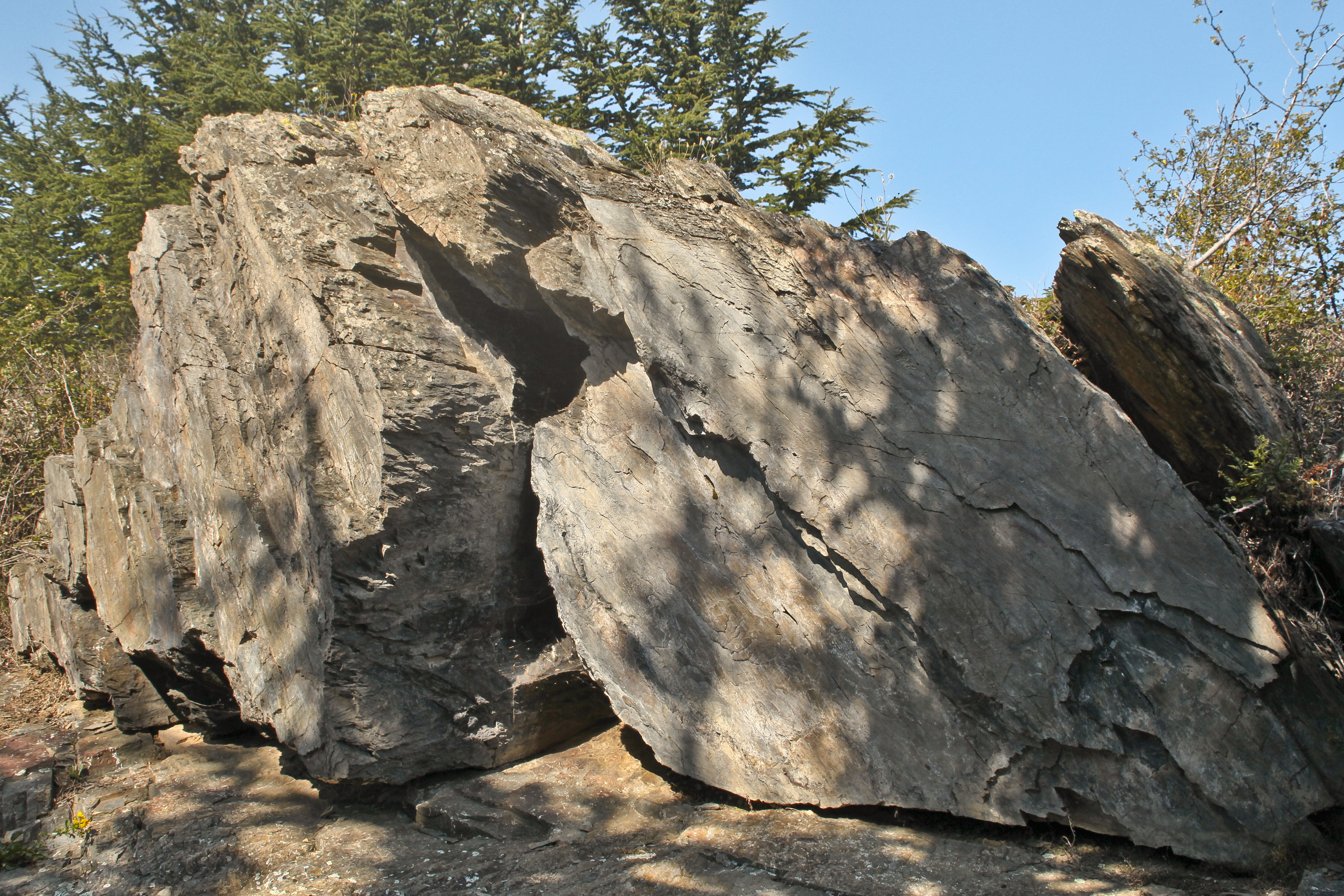 Rocher gravé de Fornols .